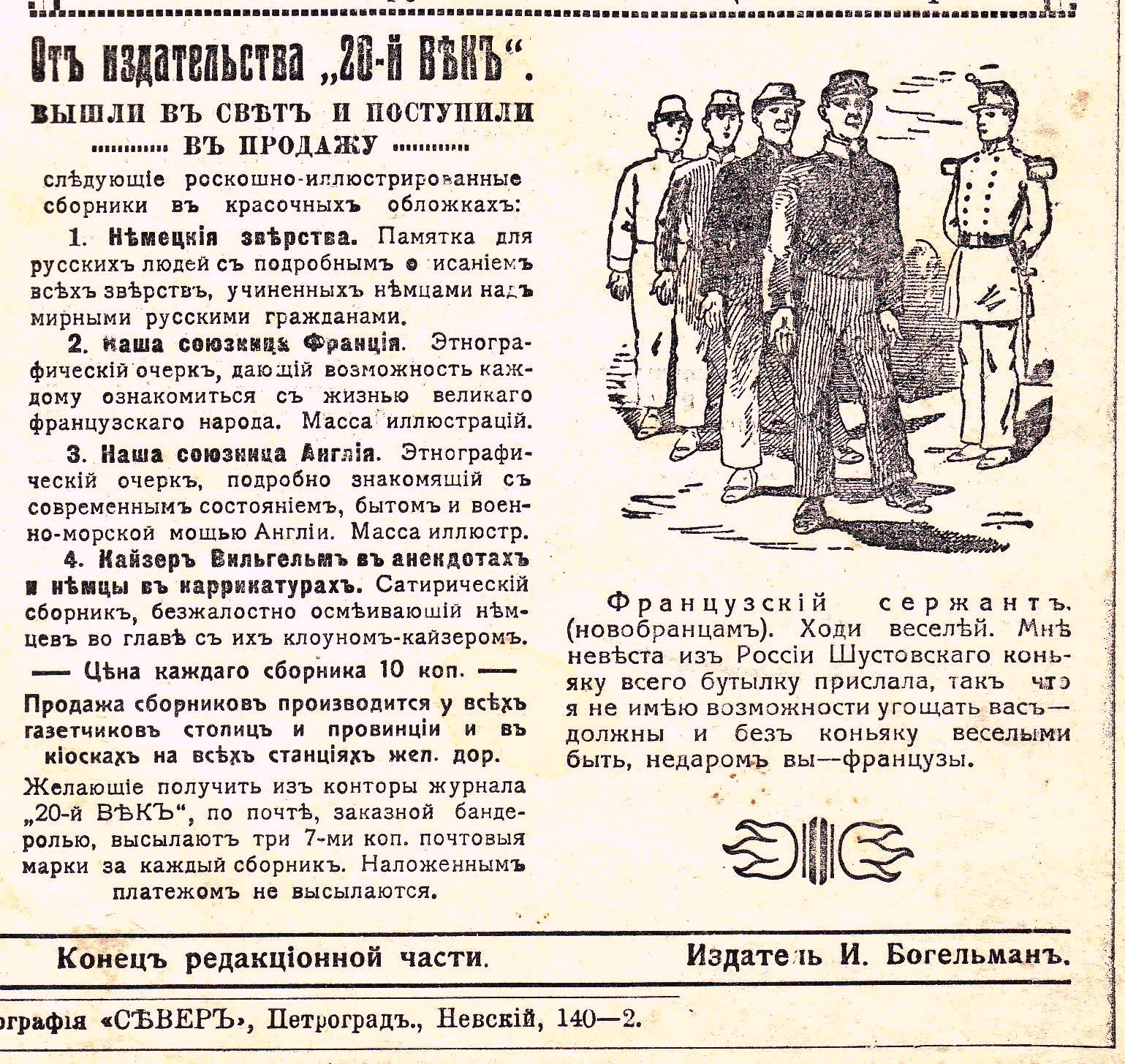 Скрытая реклама (в виде рисунка про французского сержанта и новобранцев) коньяка Шустова. Журнал «20 век», Первая мировая война, номер 39, сентябрь, за 1914 год. Последняя страница журнала.